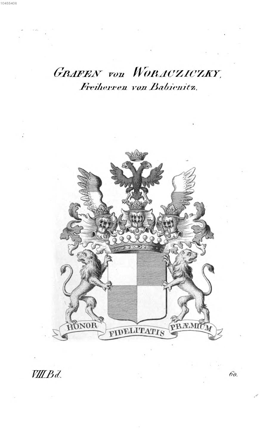 Wappen Woracziczky Babienitz - Tyroff AT.jpg